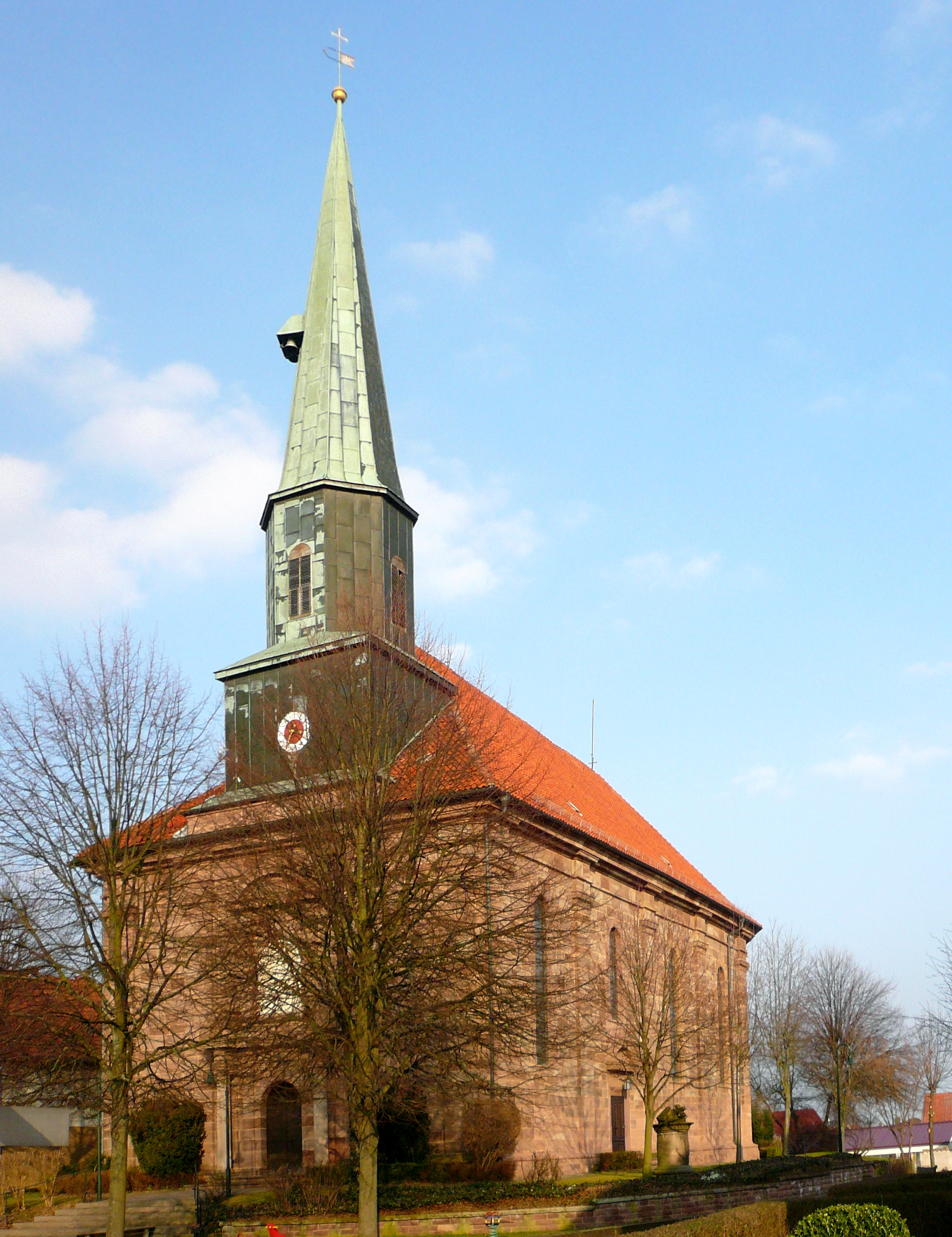 Katholische Kirche St. Georg in Wollbrandshausen, erbaut 1796. Klassizistisch, aus Rotsandsteinquadern mit Relief des Hl. Georg über dem Westportal.